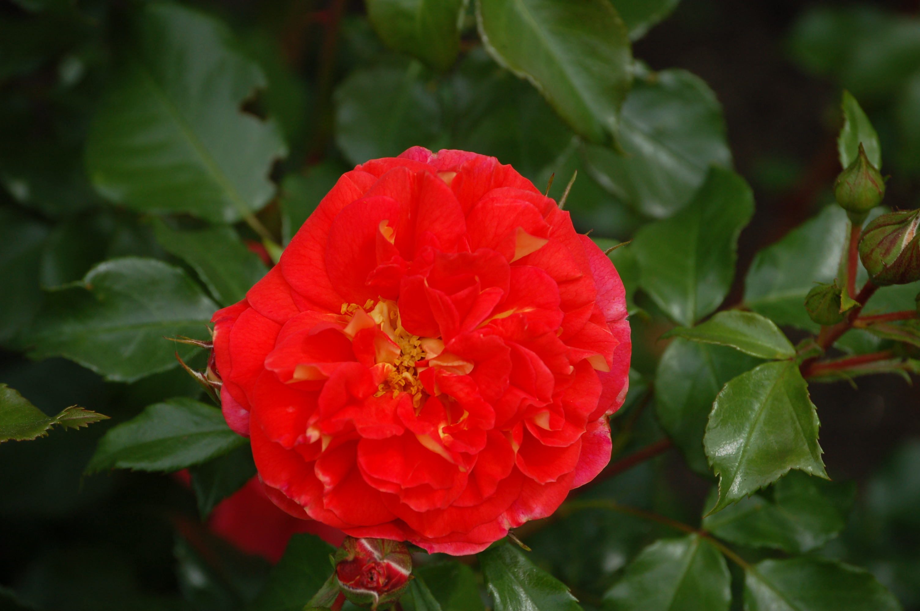 Rosa 'Gebrüder Grimm'